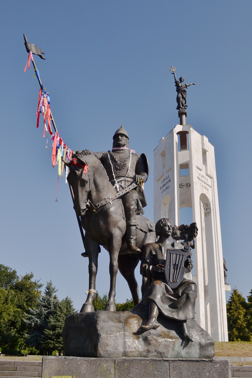 Александр Пересвет один из важнейших участников Куликовской битвы. Одержал победу в битве с тюрским богатырём Челубеем, пронзив его копьём, при этом погибнув сам.